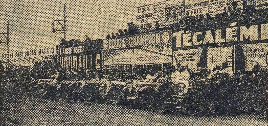 Les 24 Heures du Mans 1927, après l'arrivée.